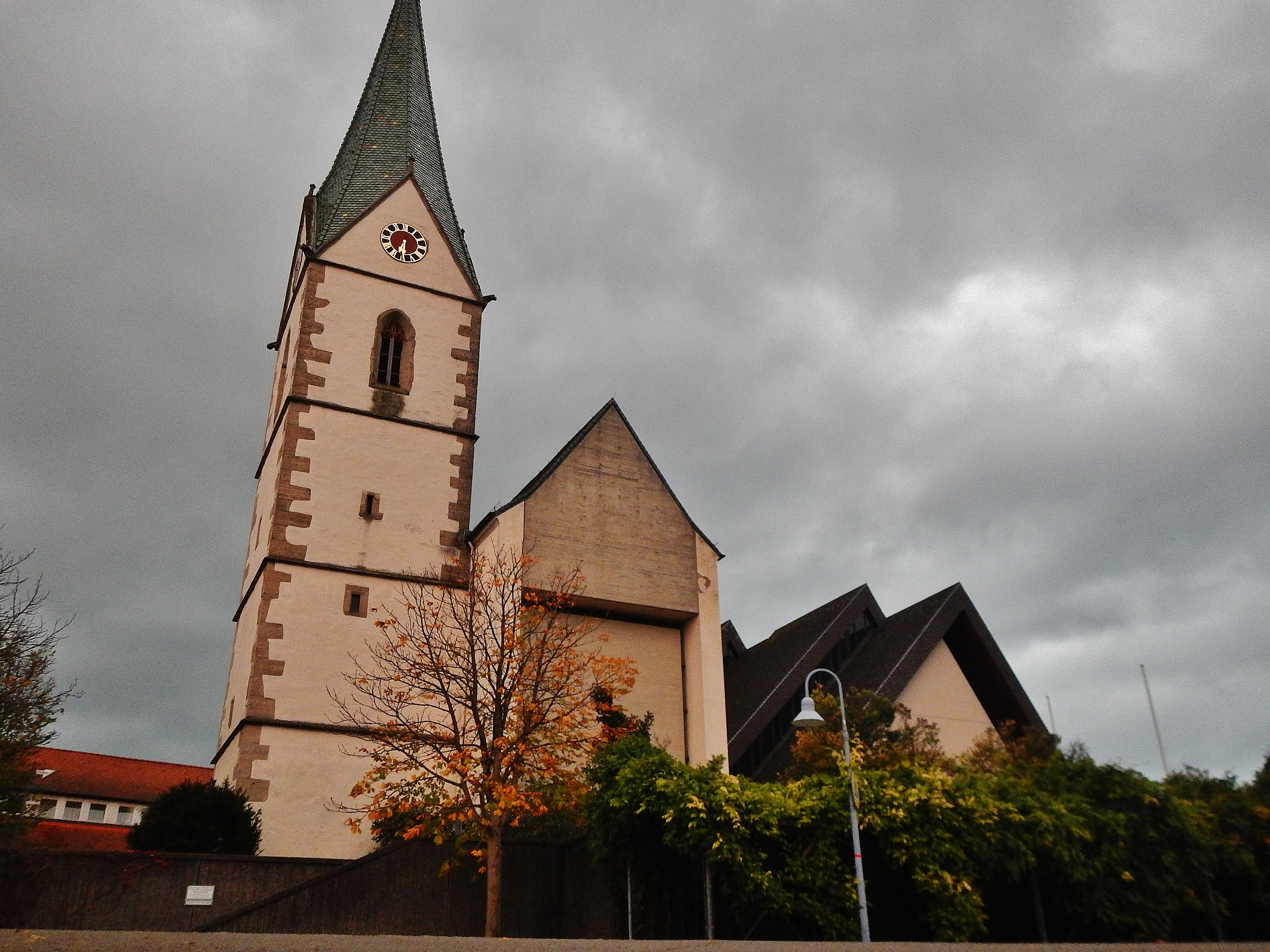 Katholische Kirche Heilig Geist in Ergenzingen